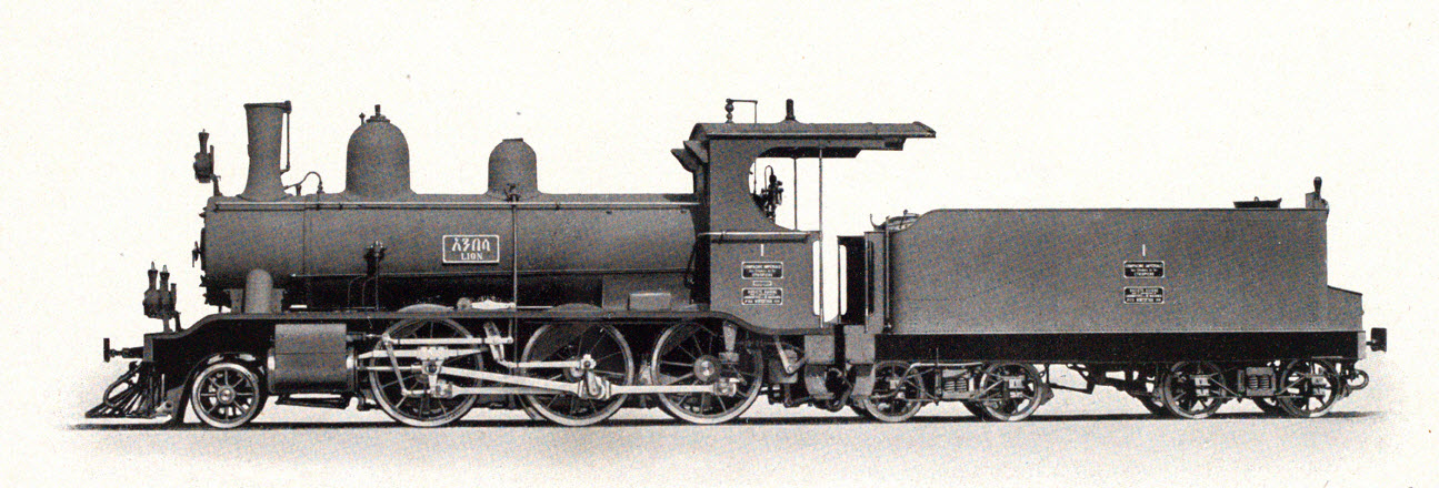 3/4 gekuppelte 2 Zylinder-Lokomotive Nr. 1 „Lion“für die Äthiopischen Bahnen. Cropped version of SBB Historic - 015 - 3 4 gekuppelte 2 Zylinder-Lokomotive für die Äthiopischen Bahnen.tiff